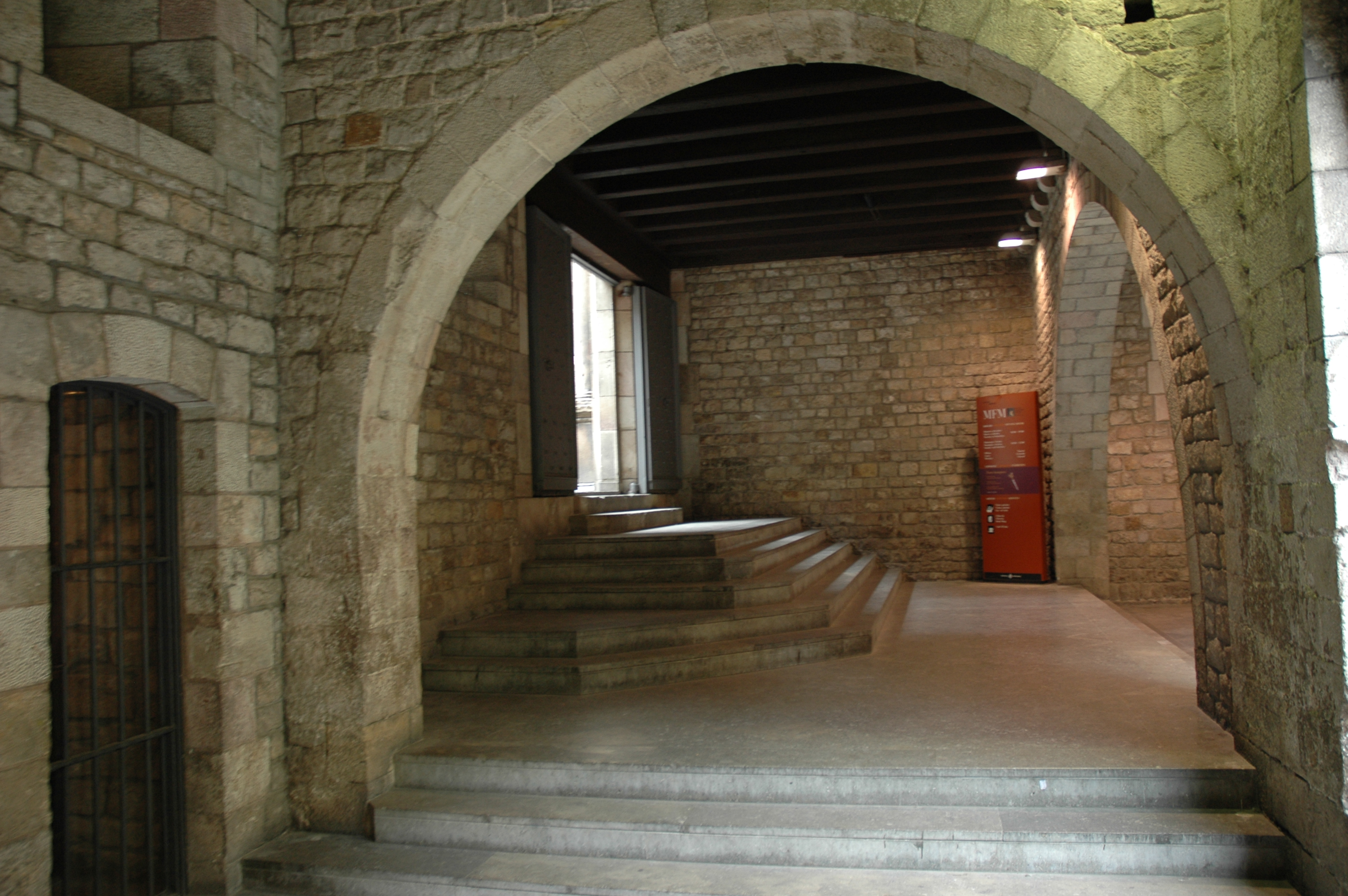 Museu Frederic Marès - Pati interior